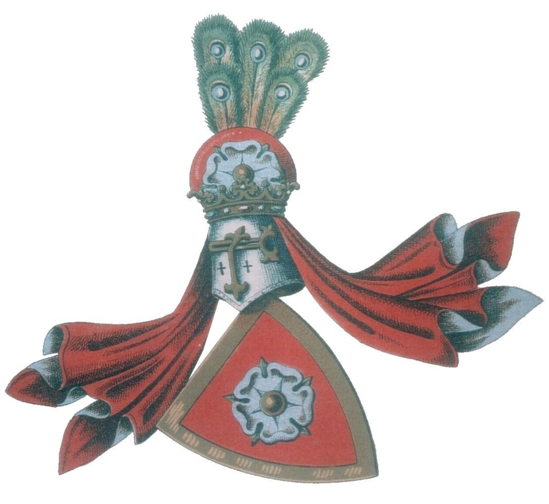 Familienwappen von Müllenheim